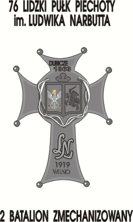 Plakat symbolizujący kultywowanie tracyji 76 pp przez 2/29 BZ